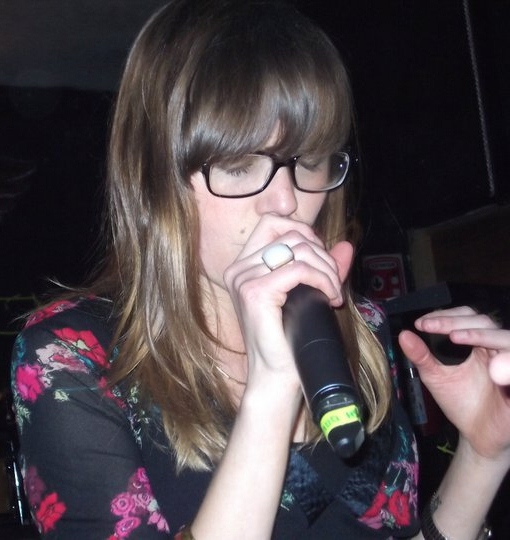 Foto tomada a Denise Gutiérrez el 13 de marzo del 2011, en un concierto en la ciudad de Puebla, México